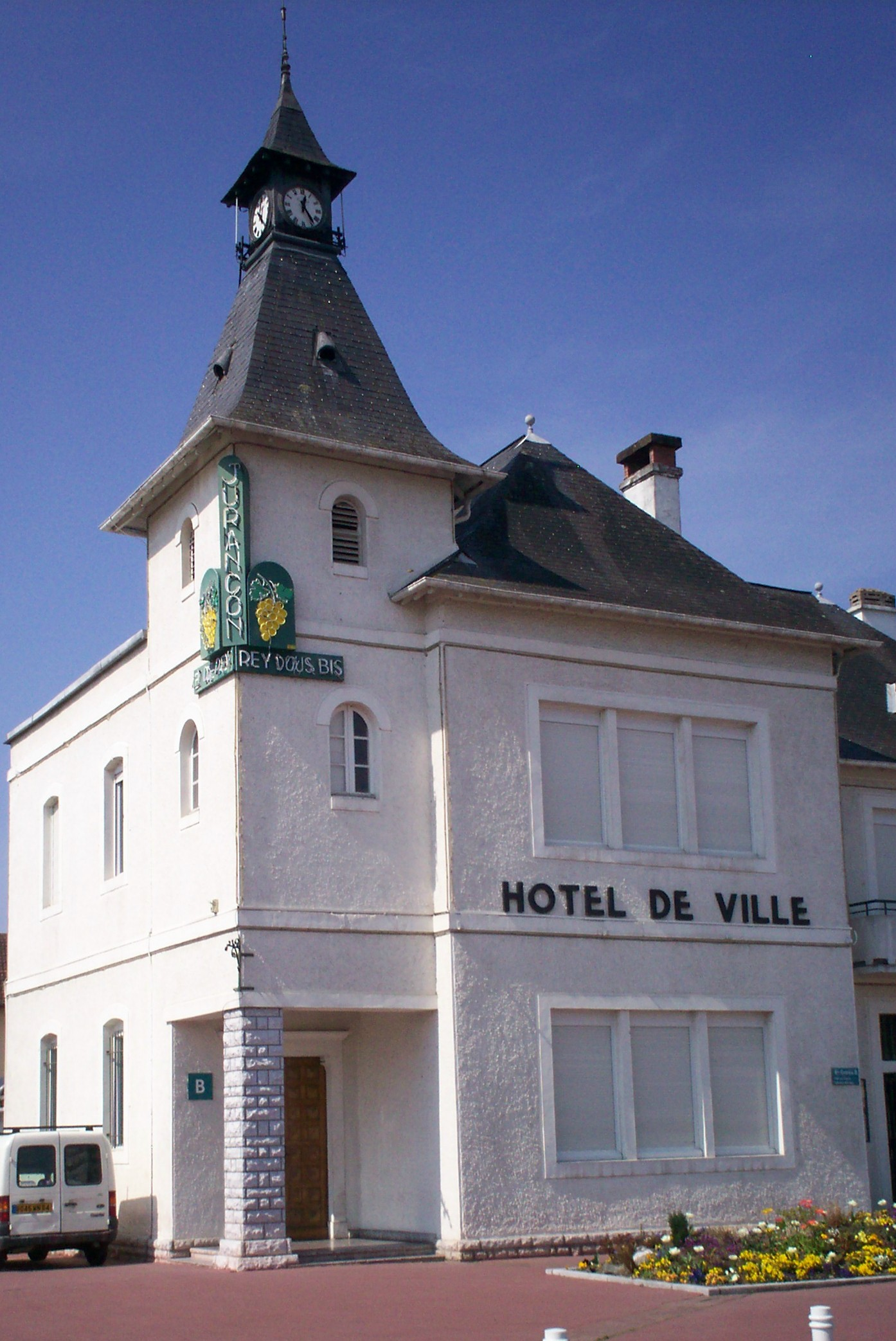 Mairia de Juranson ostendent l'inscripcion Bi de rey - Rey dous bis